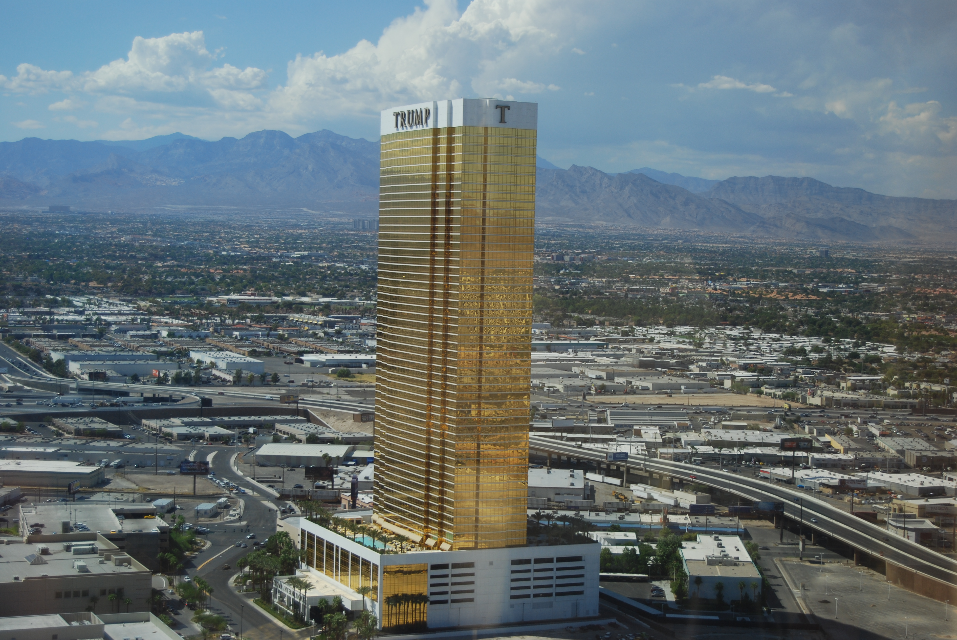 TRUMP TOWER